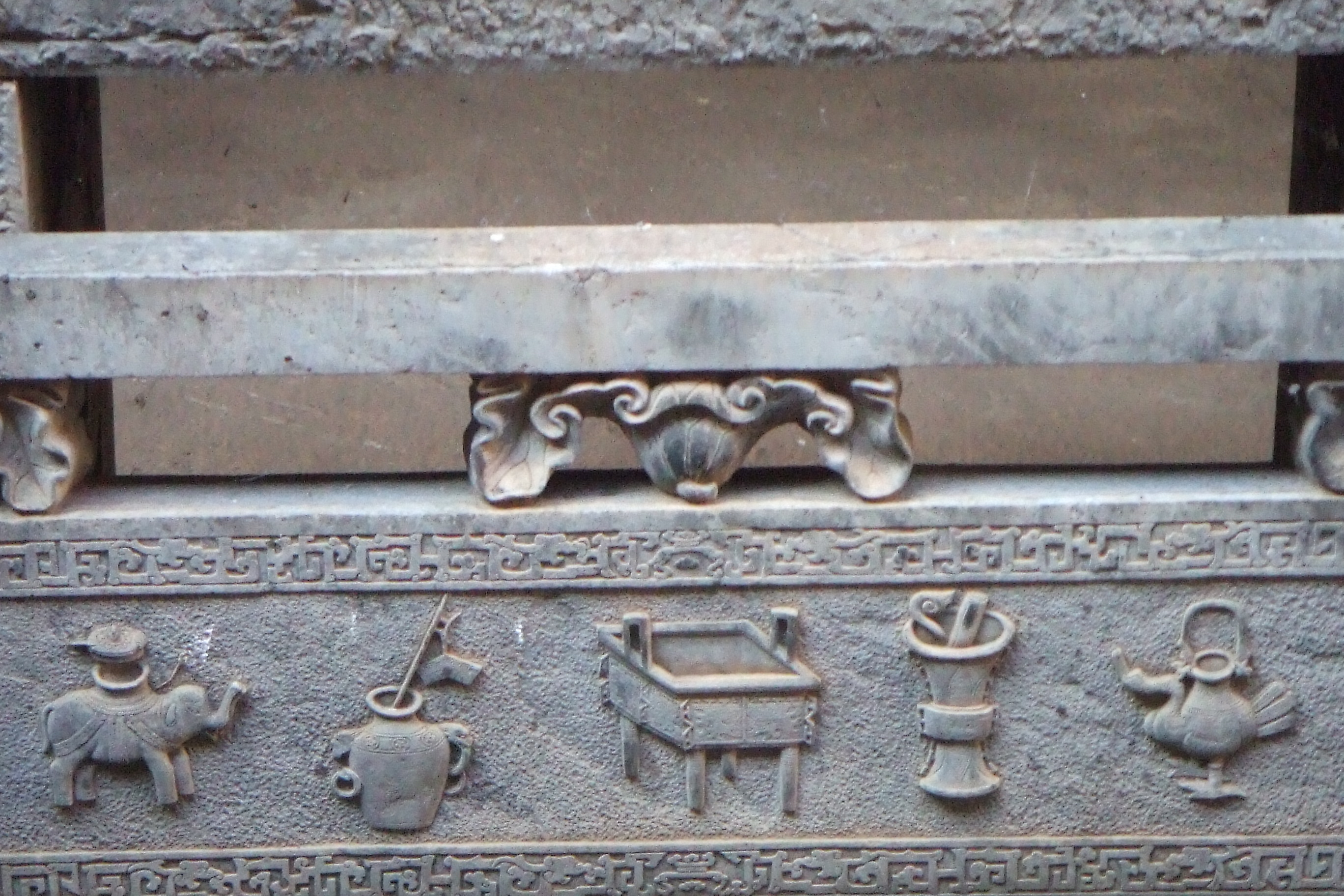 中國安徽省黃山市歙縣北岸鎮的吳氏宗祠，皇家祭祀用禮器圖之一（FinePix Z1富士通數碼相機/洪洋/ 2005/09/13）